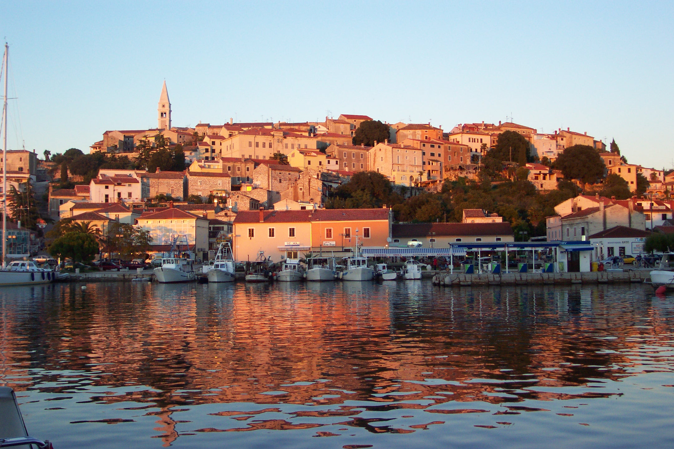 Harbour in Vrsar, Kroatien